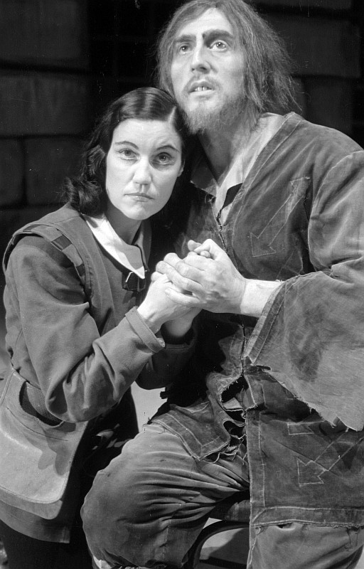 Original image description from the Deutsche Fotothek Szenenbilder